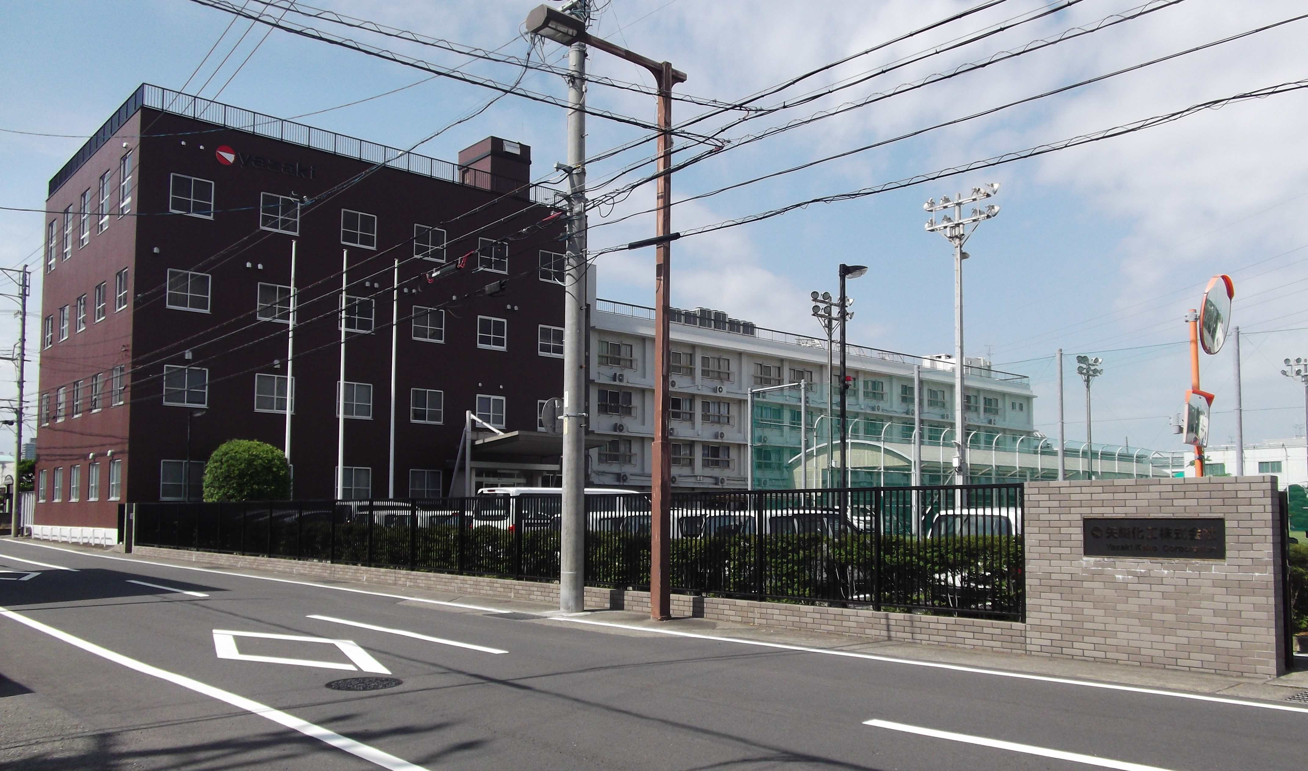 矢崎化工株式会社本社